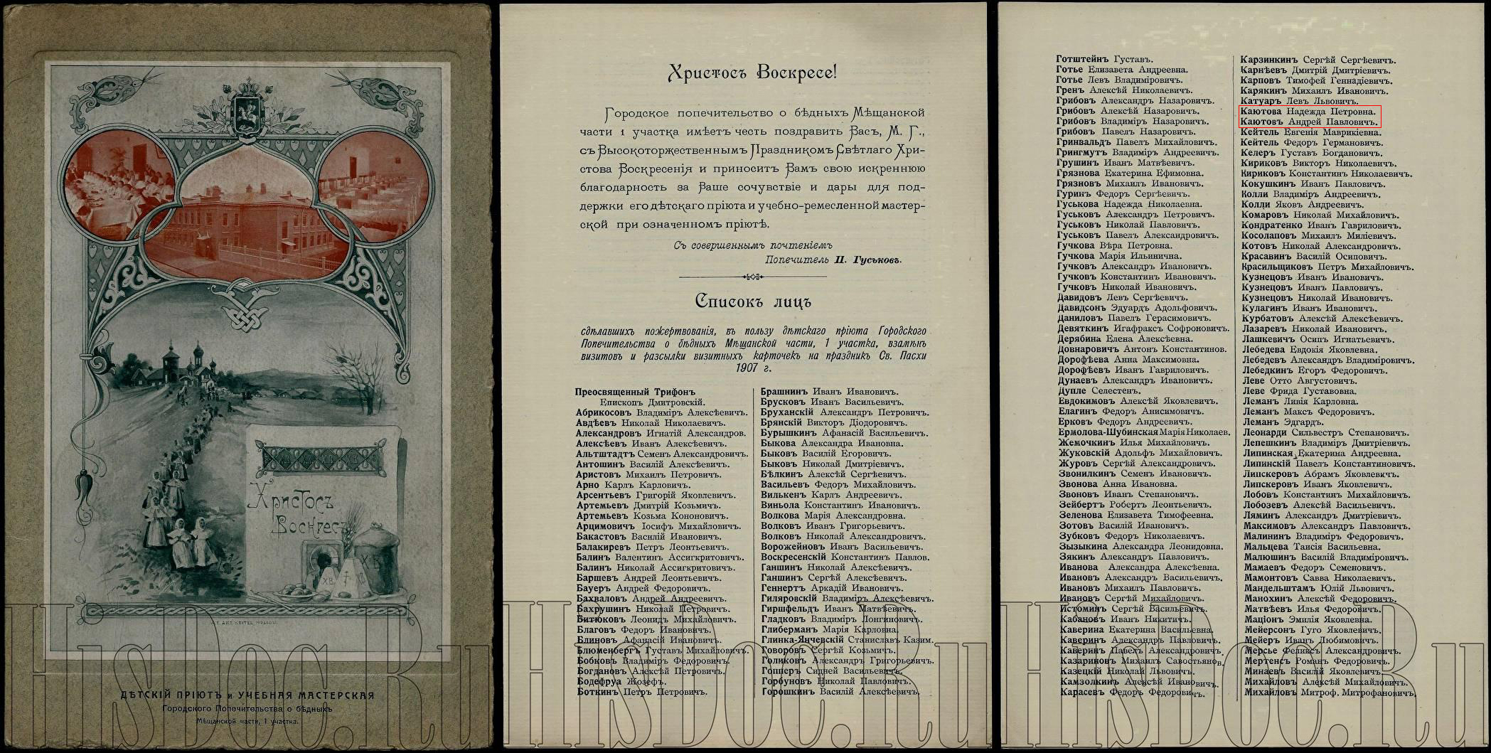 Надежда Ламанова-Каютова и Андрей Каютов в списке сделавших пожертвования в пользу детского приюта Городского Попечительства о бедных Мещанской части, 1 участка